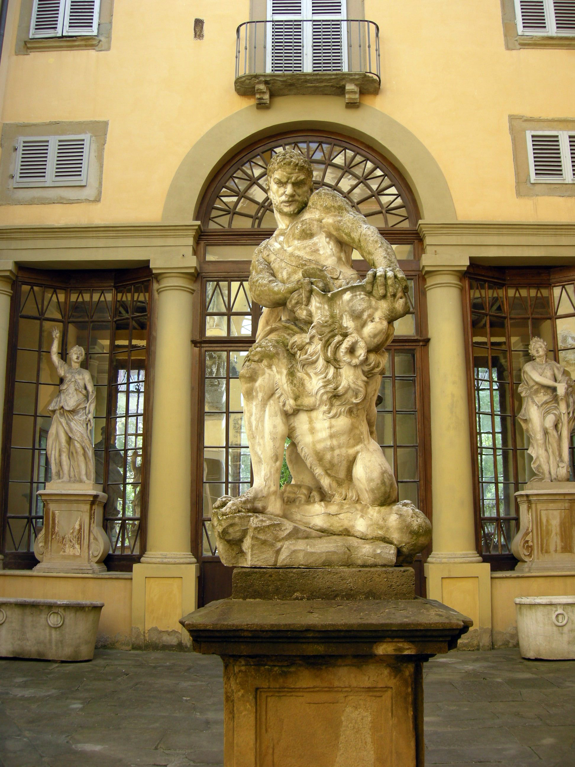 Palazzo ximenes panciatichi da sangallo, cortile 03 ercole